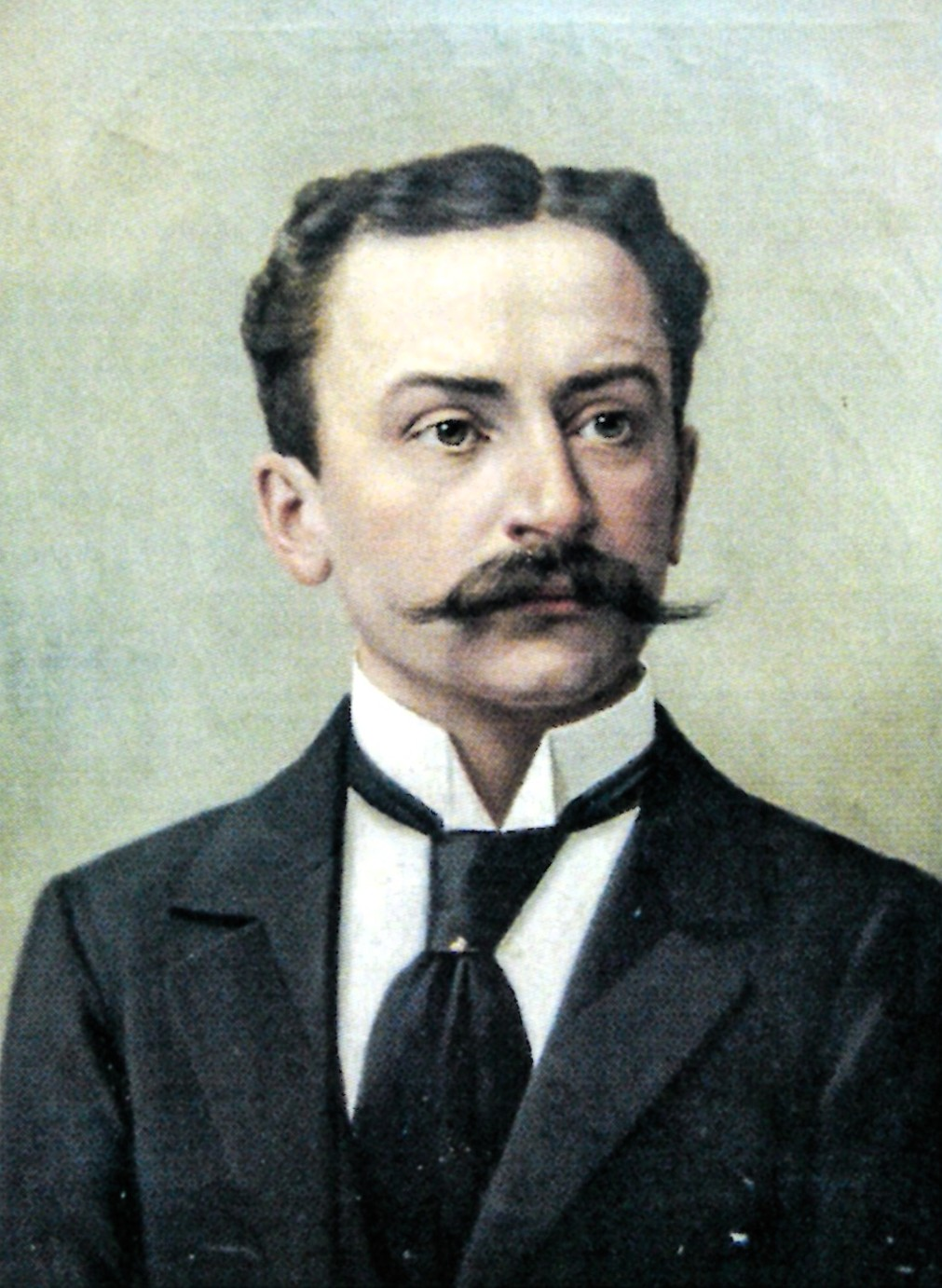 Friedrich Christian von Deuster (1861-1945), deutscher Gutsbesitzer und Politiker, gemalt von Ferdinand Behrens in Meran 1896